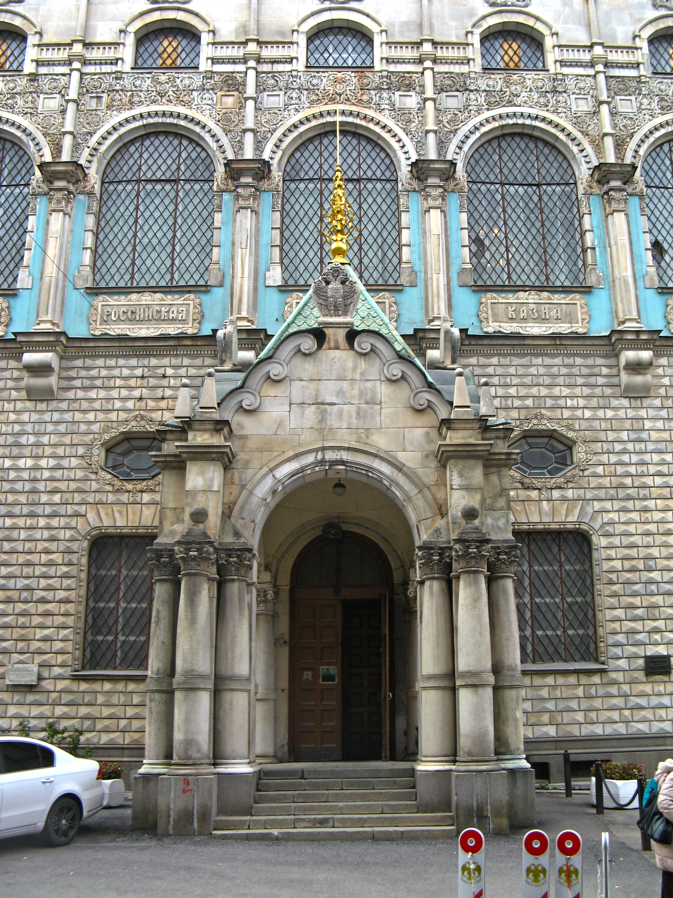 Здание Ссудной казны: Настасьинский пер., дом 3, строение 1, Тверской, Центральный округ, Москва